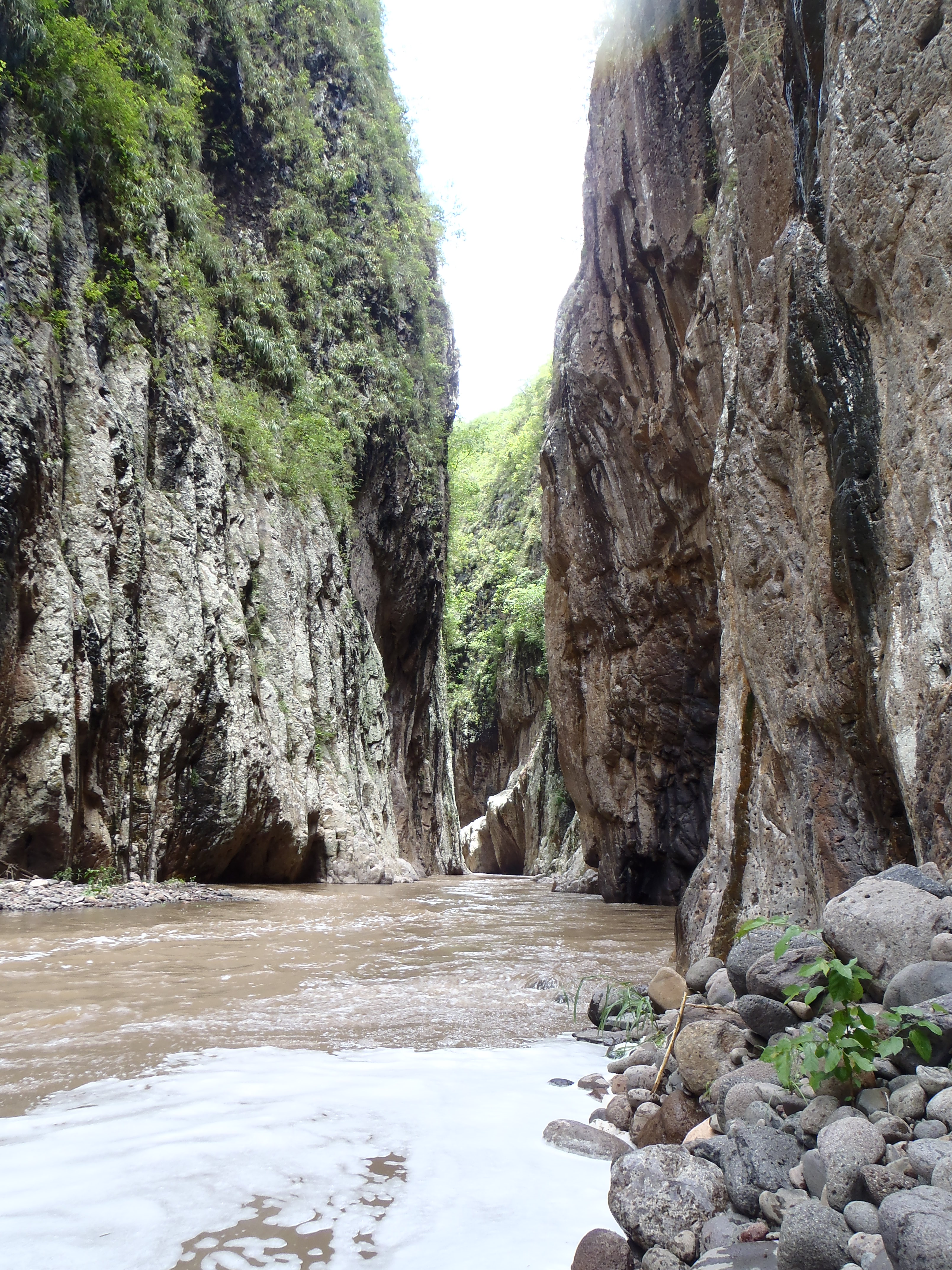 Canyó de Somoto, a la comunitat de Solís, municipi de Somoto, departament de Madriz, Nicaragua